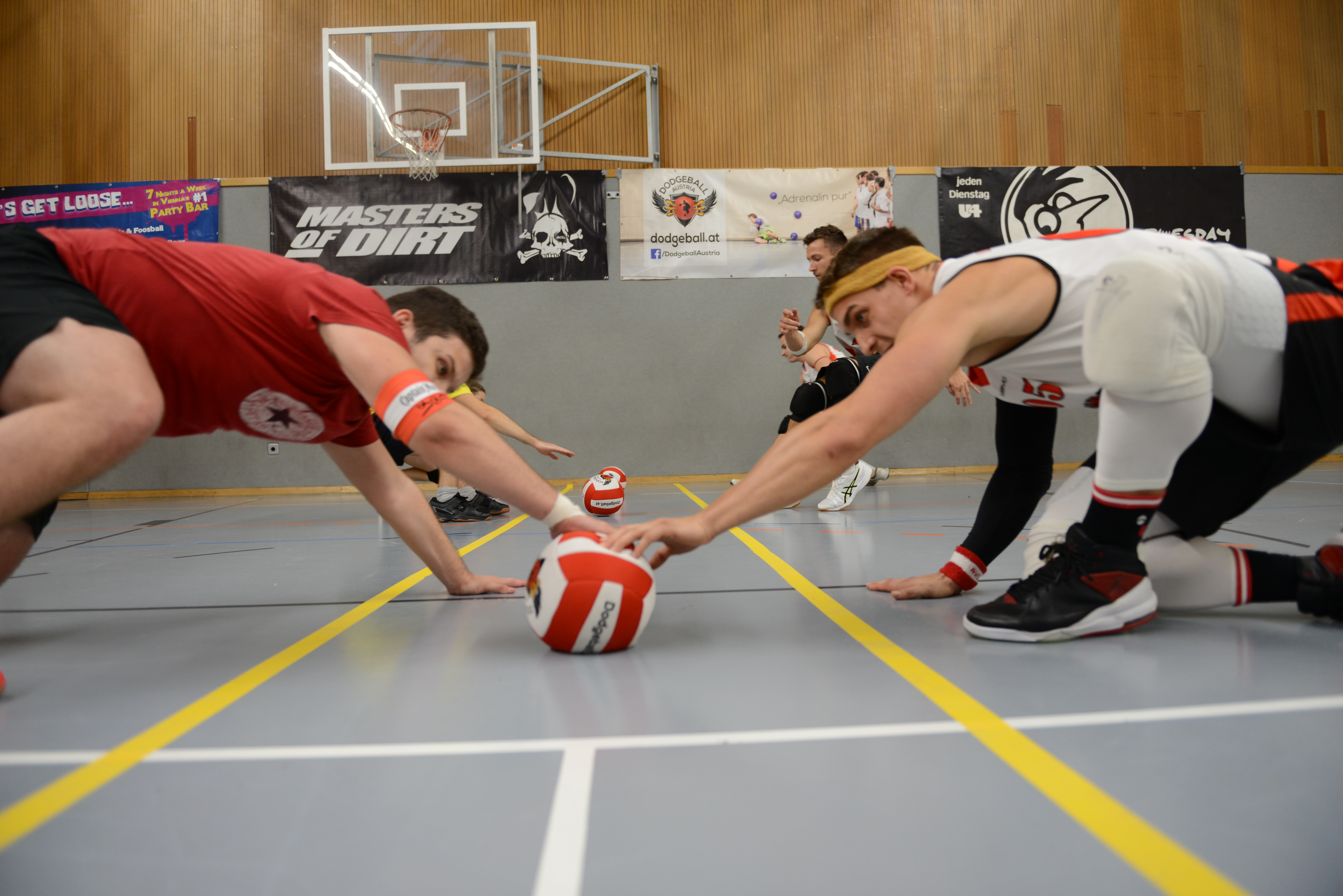 Dodgeball Opening Rush gross